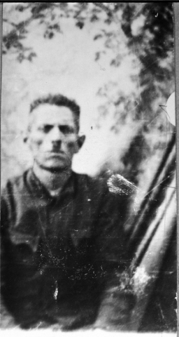 Аврам Садикарио.